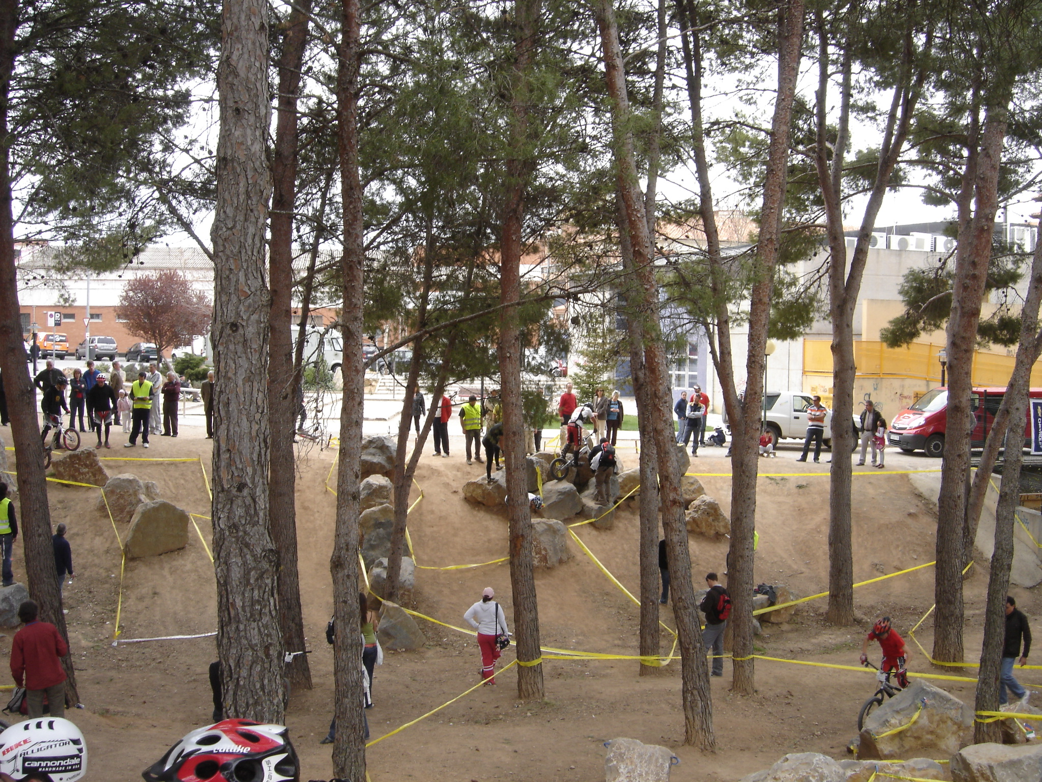 Teruel 2008 - Campeonato de España Biketrial.